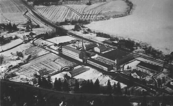 Ilmakuva Epilästä vuonna 1930